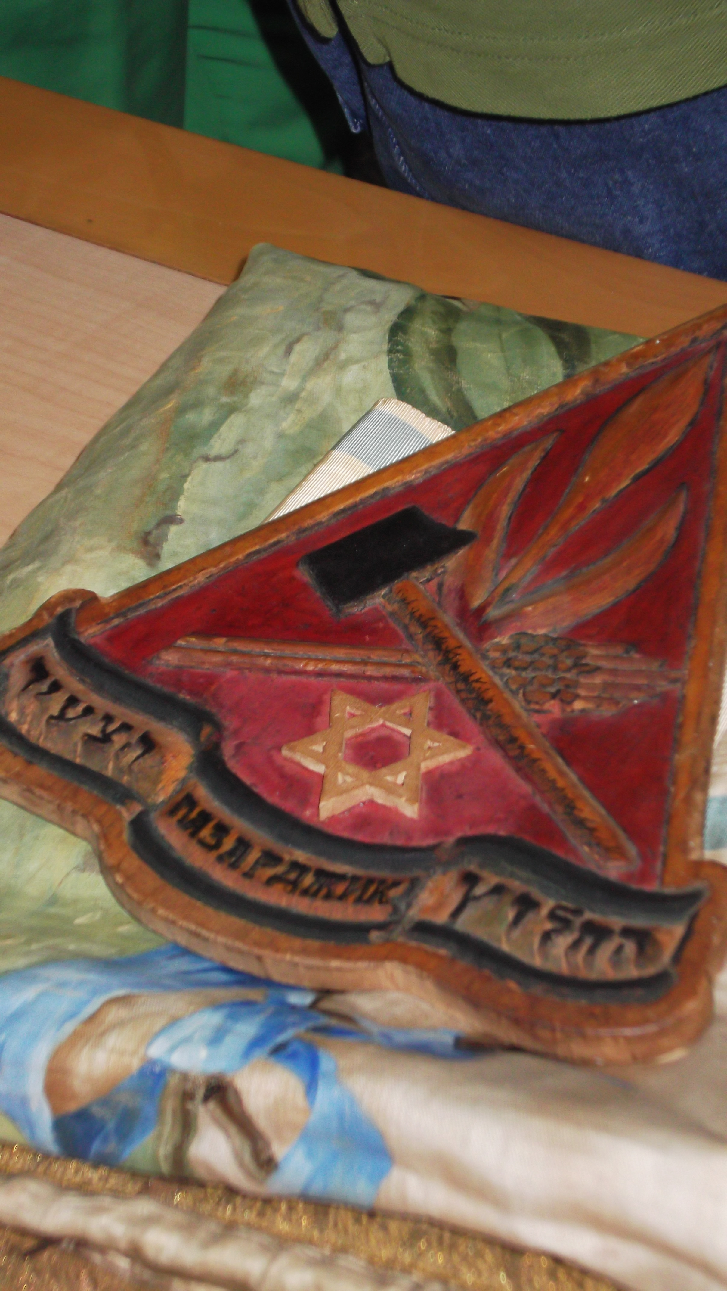 מגן תנועת החלוץ הצעיר מהעיר פאזארדז'יק בבולגריה. המגן נמסר לחבר התנועה ב-1947 וצולם ב-2012 בישראל